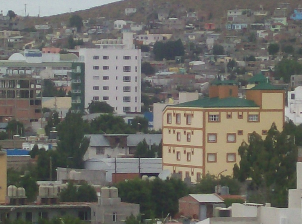 vista a edificios